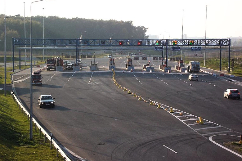 Warnowtunnel Rostock, Blick auf die Mautstelle vor dem östlichen Tunnelportal